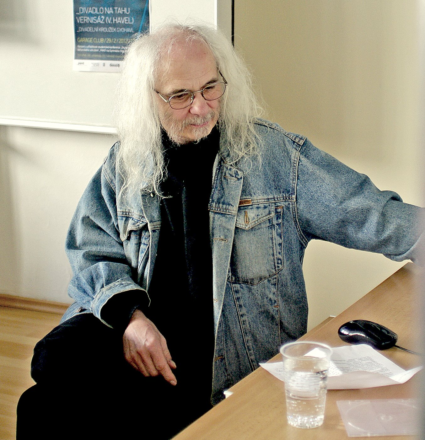 Josef Rauvolf na dějepisné konferenci o druhé kultuře na gymnáziu Olgy Havlové, Ostrava, 2012